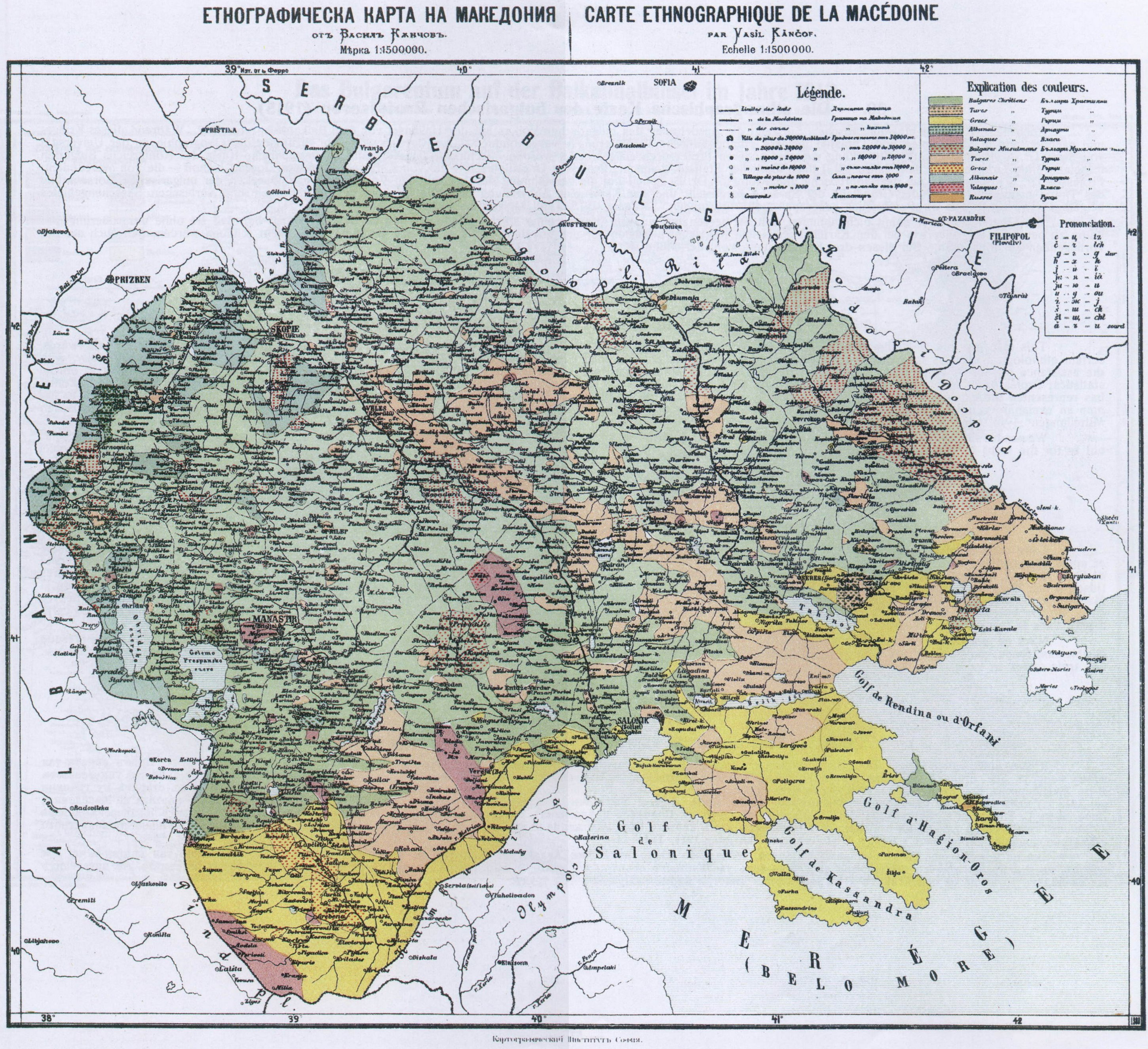 Етнографската карта на Македония на Васил Кънчов от Македония. Етнография и статистика.